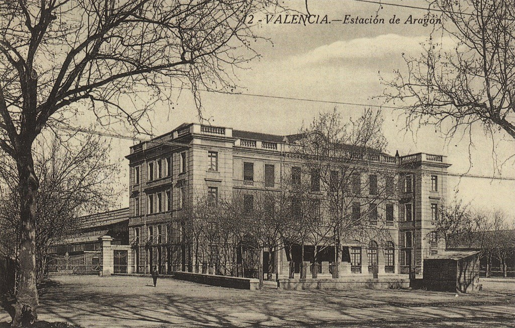 Estació d'Aragó de València, demolida l'any 1974.